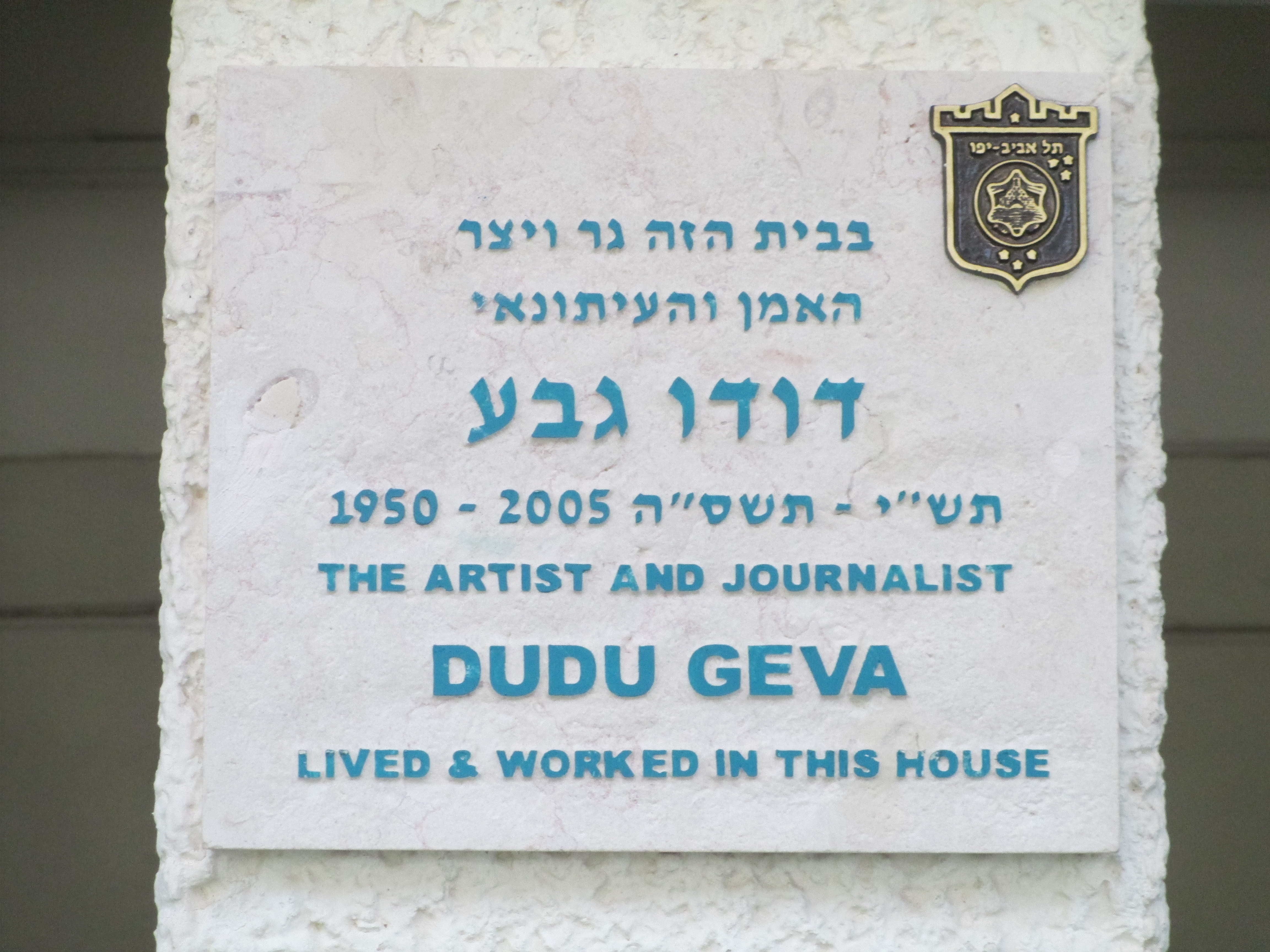 לוחית זיכרון על ביתו של דודו גבע ברח' צייטלין 17 בתל אביב